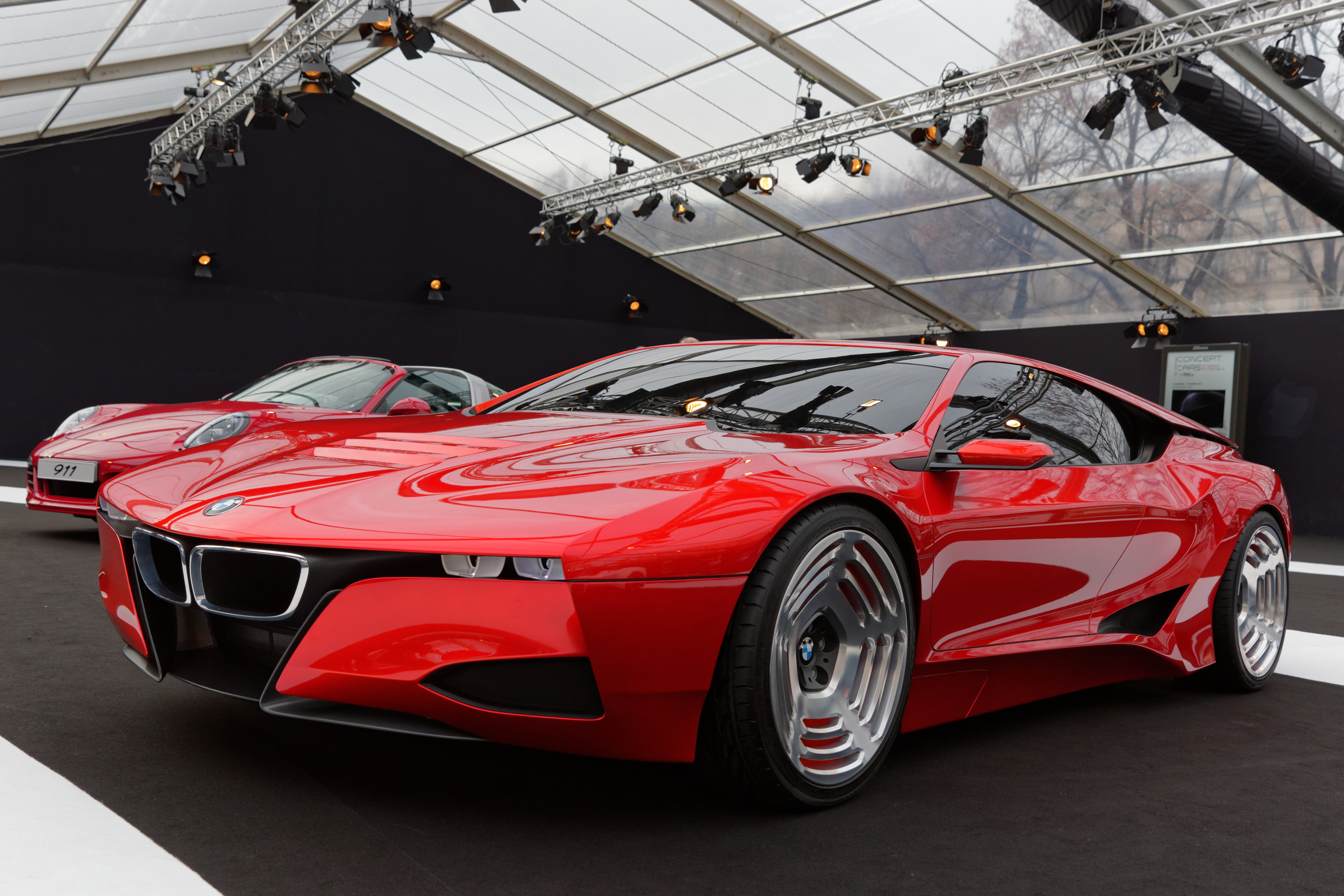 La BMW M1 Hommage exposée lors du festival automobile international 2015.